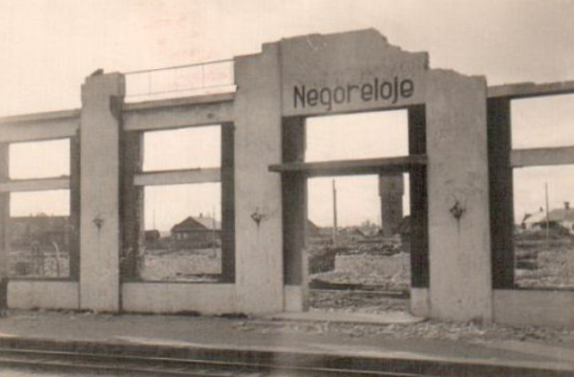 Беларуская (тарашкевіца): Негарэлае (Nieharełaje). Чыгуначная станцыя